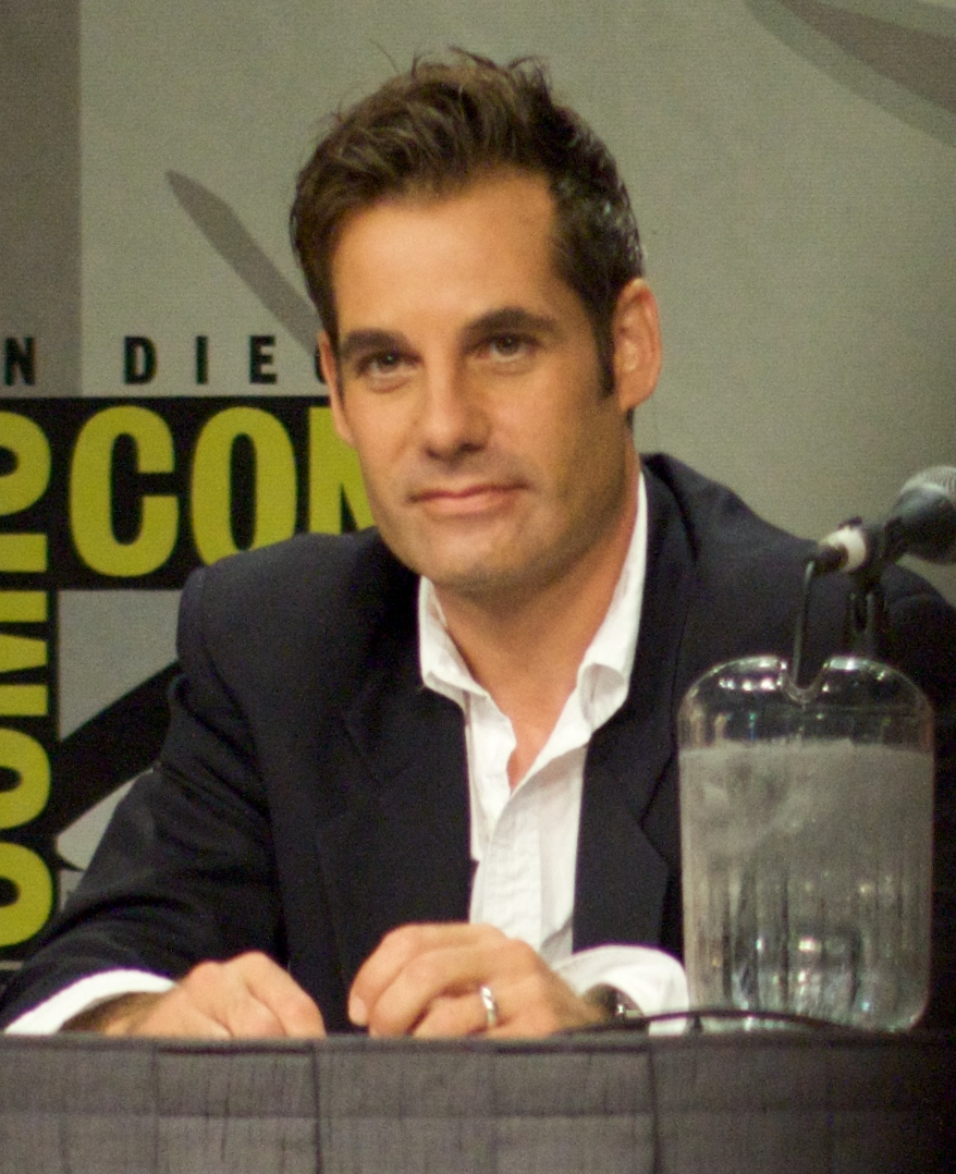 El actor Adrian Pasdar en la Comin-Con 2008